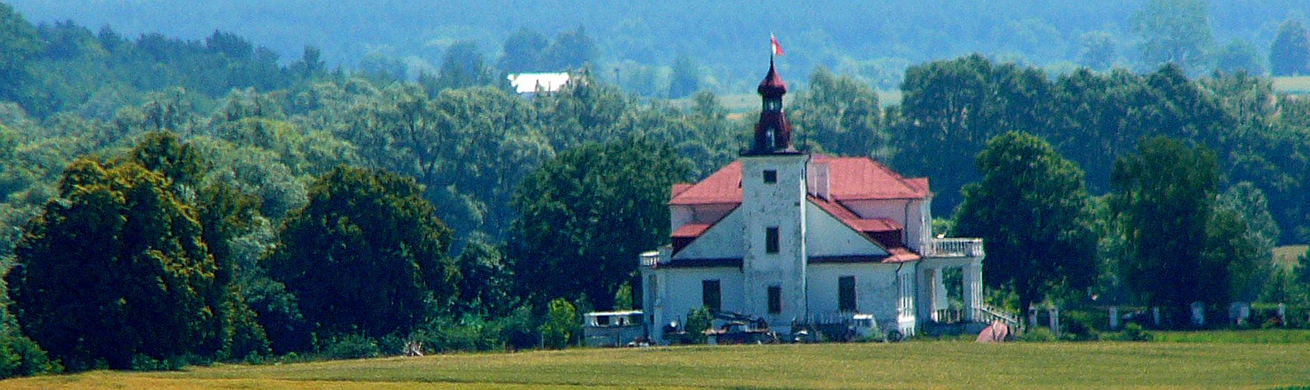 Zespół pałacowy, XIX/XX; Czumów 05.1972.